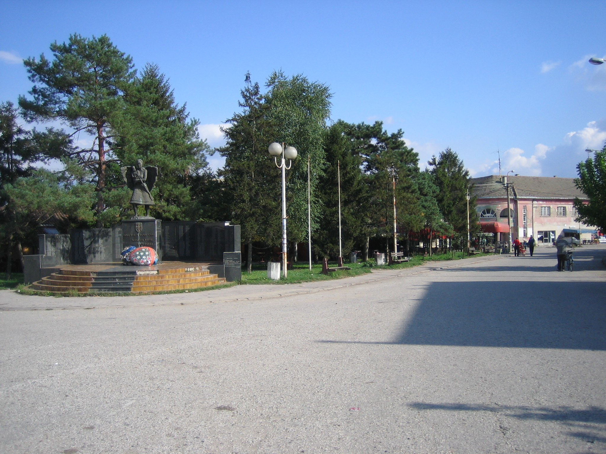 Ово је слика центра села Милошевац. Аутор, сам ја, Владимир Миловановић, и усликана је мојим дигиталним фотоапаратом.